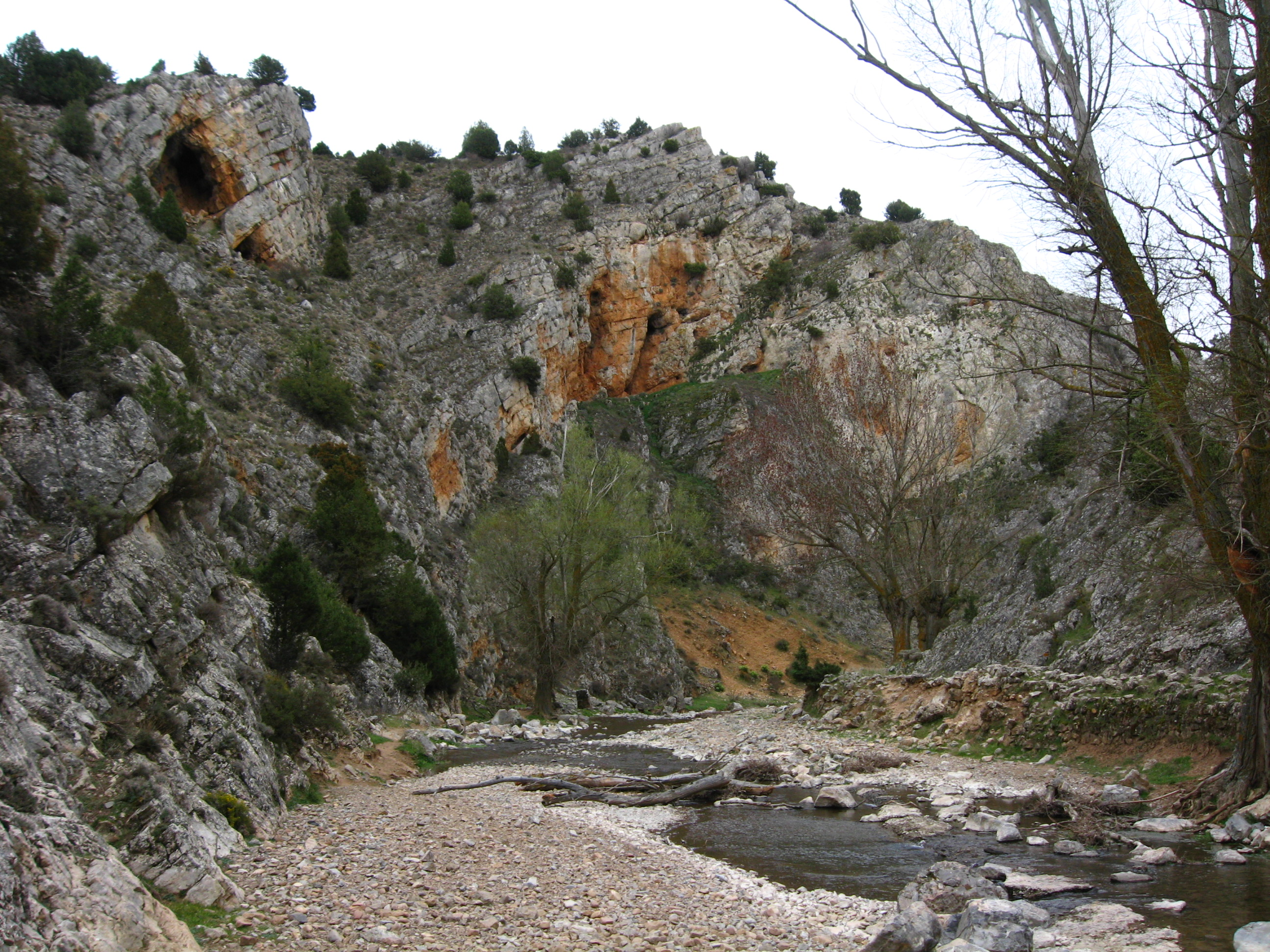 Sabinares de Ciria-Borobia This is a photography of a Site of Community Importance in Spain with the ID: ES4170056. Natura2000 entry, EEA entry